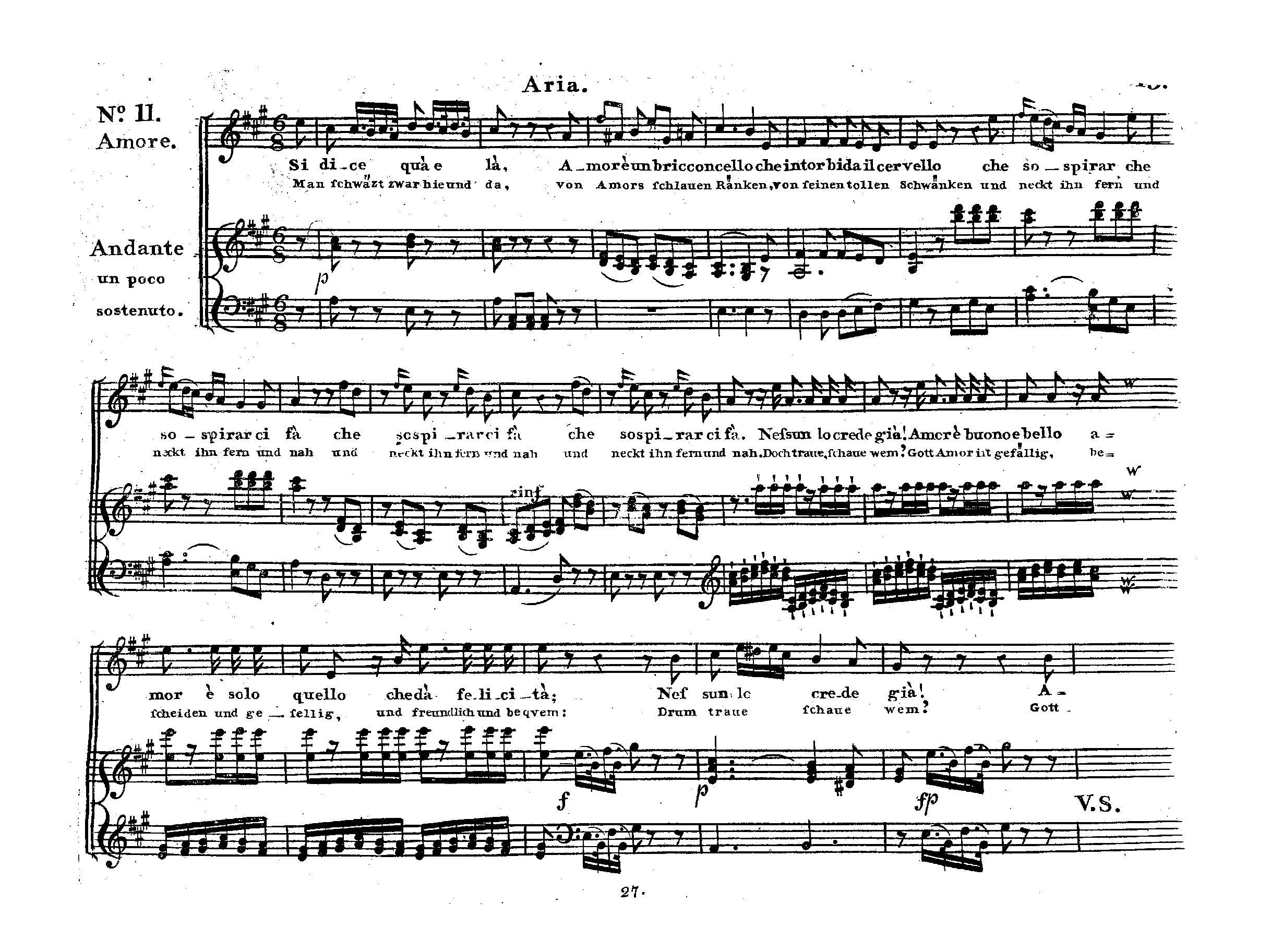 Arie Nr. 11 des Amor aus L'arbore di Diana (1787) von Martín y Soler. Klavierauszug, Bonn: N. Simrock, n.d.(ca.1793). Plate 27. Text von Lorenzo da Ponte